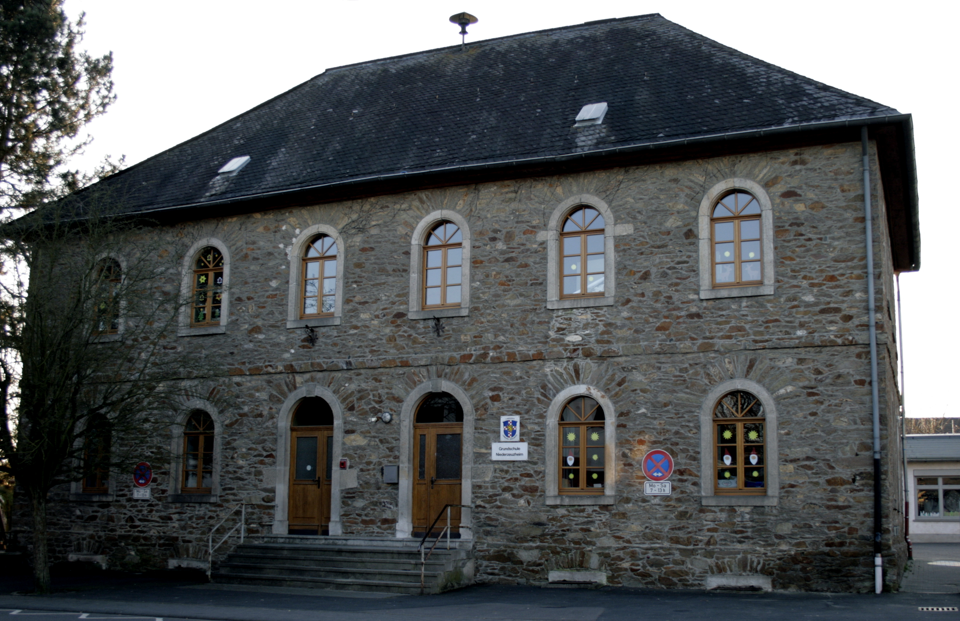 Grundschule in Hadamar-Niederzeuzheim, Deutschland